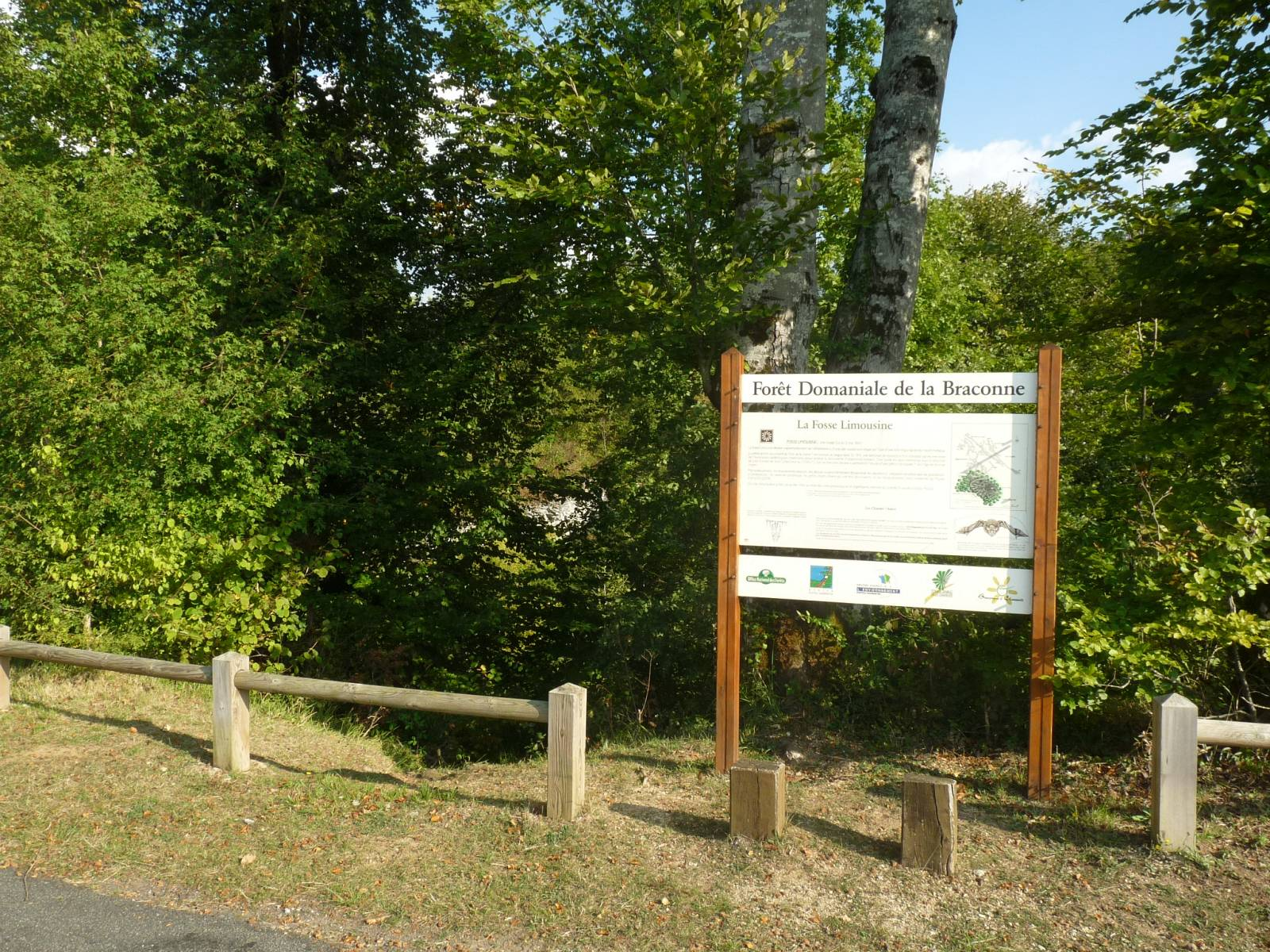 Fosse limousine, forêt de la Braconne (16), France